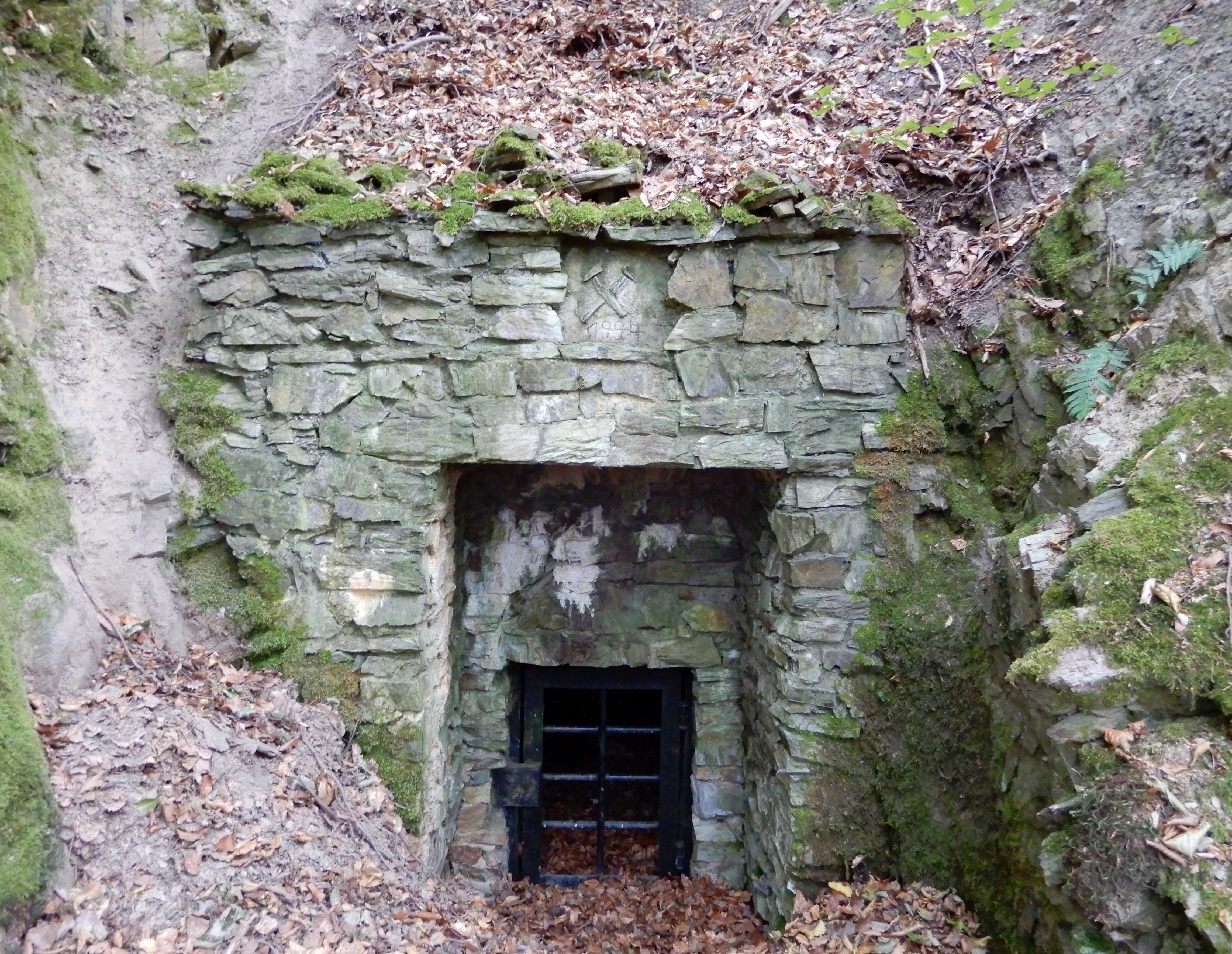 Mundloch des Schalkenburger Gangzuges